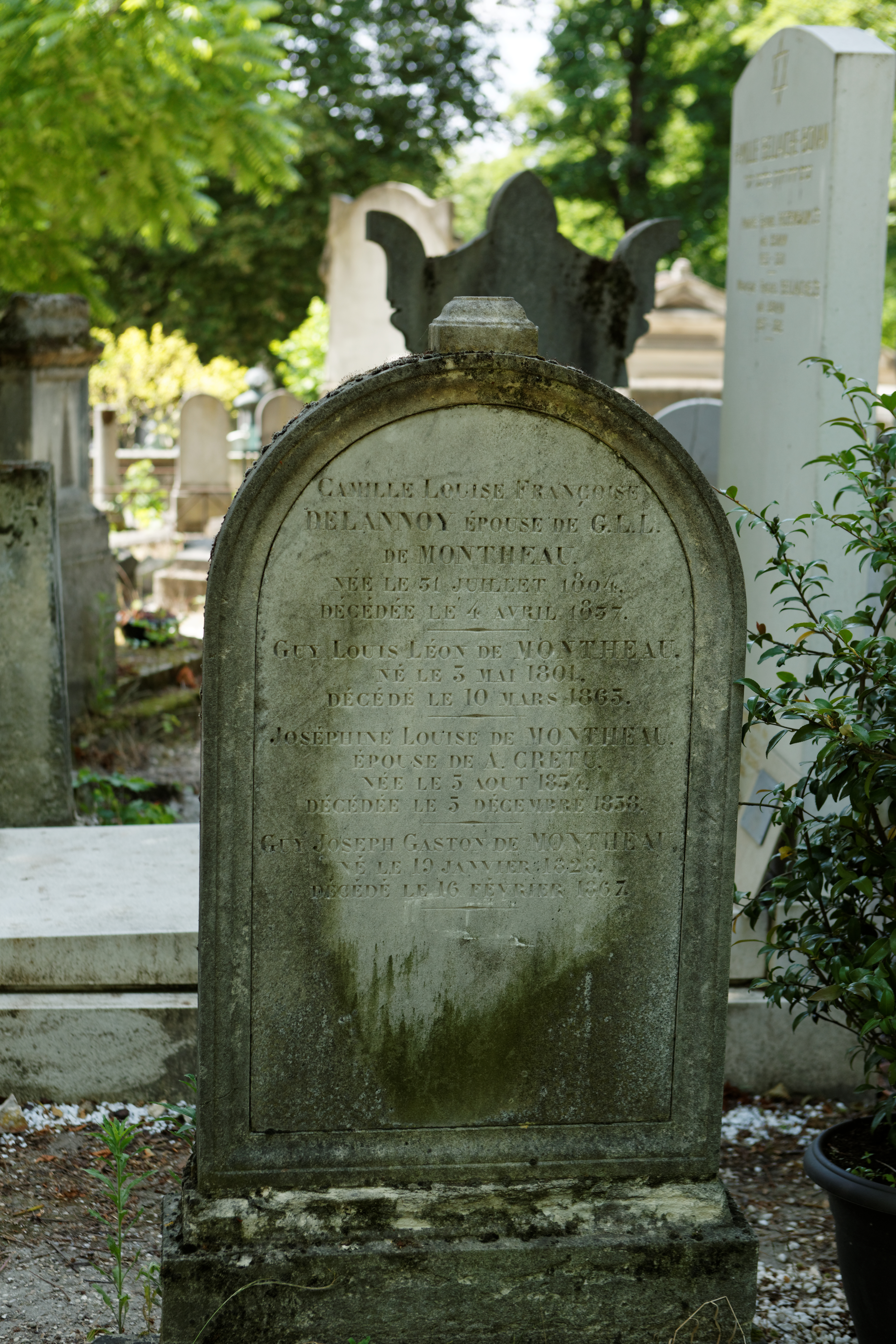 Sépulture de Guy-Louis-Léon de Montheau (1801-1865), conseiller référendaire à la cour des comptes.